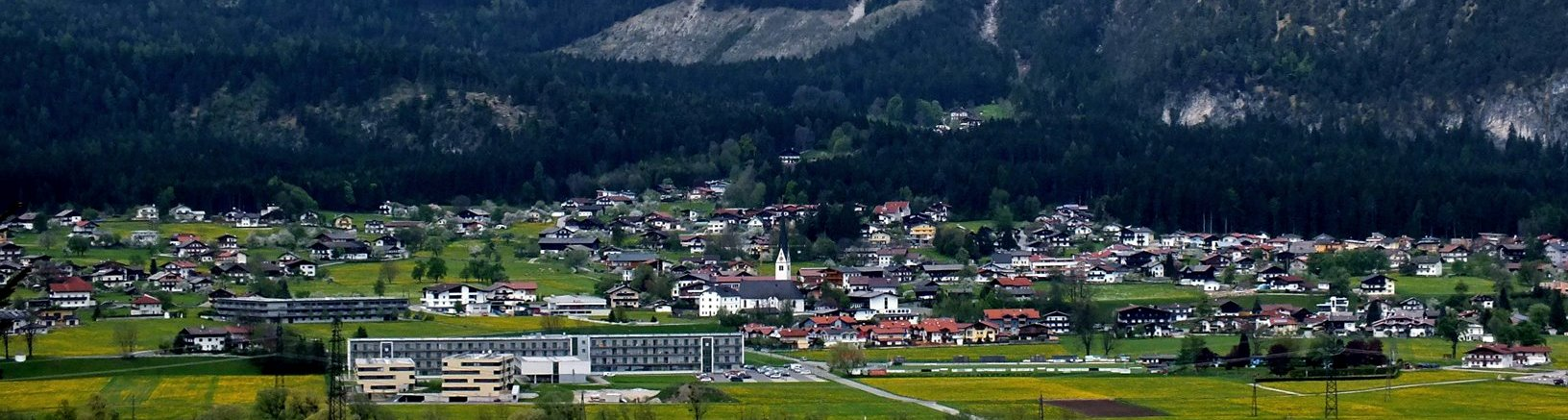 Dorfzentrum Münster im Sommer / vorne das REHA Zentrum